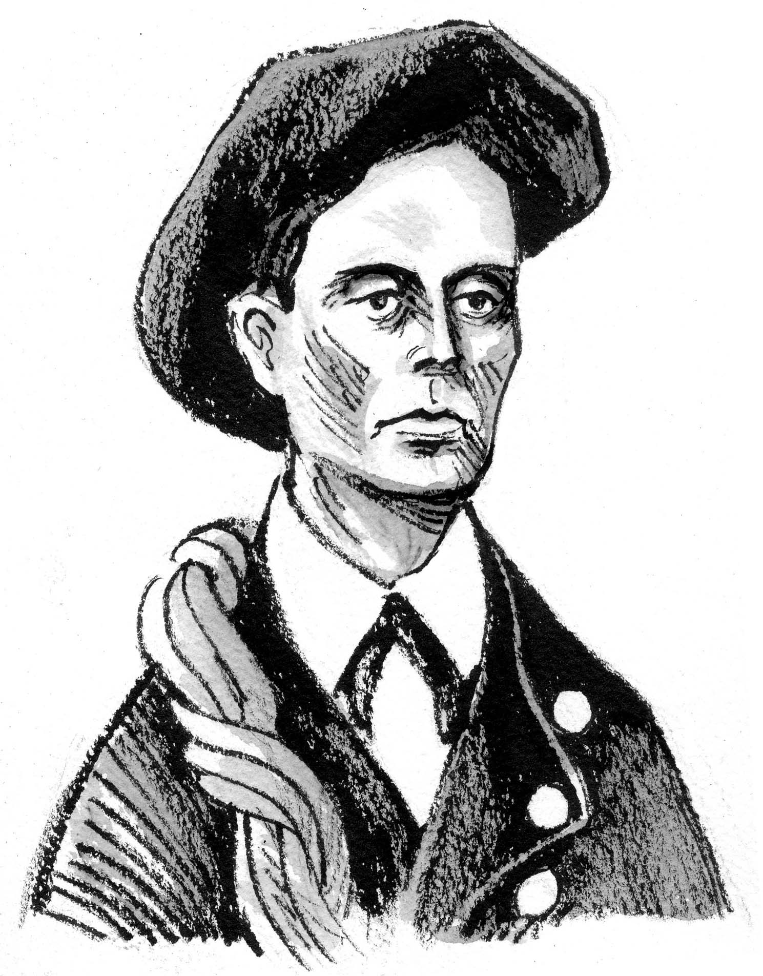 Célestin Passet, guide de Gavarnie